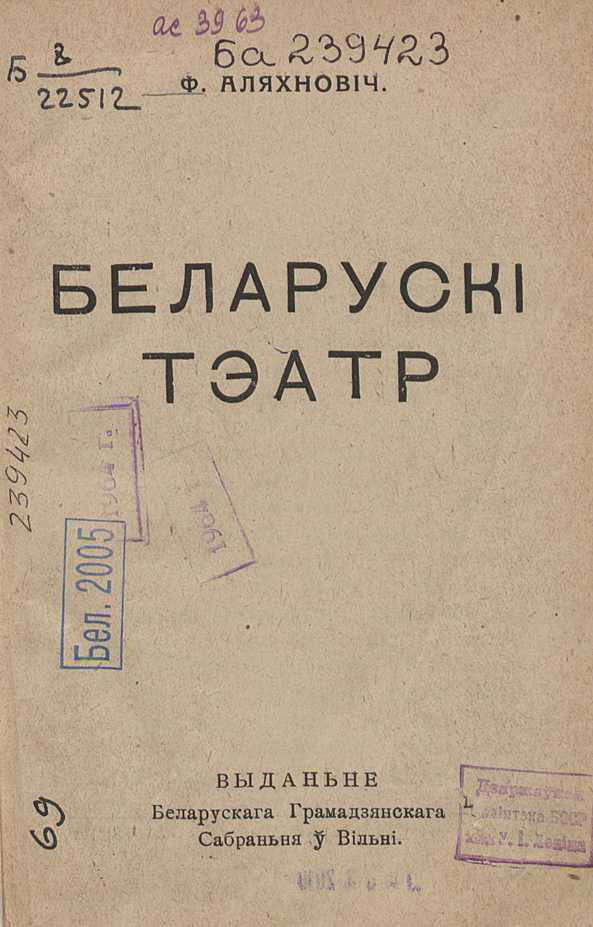 Беларуская (тарашкевіца): Вокладка манаграфіі Ф. Аляхновіча "Беларускі тэатр". Вільня : выданне Беларускага грамадзянскага сабрання, 1924 (Друкарня «Lux»).